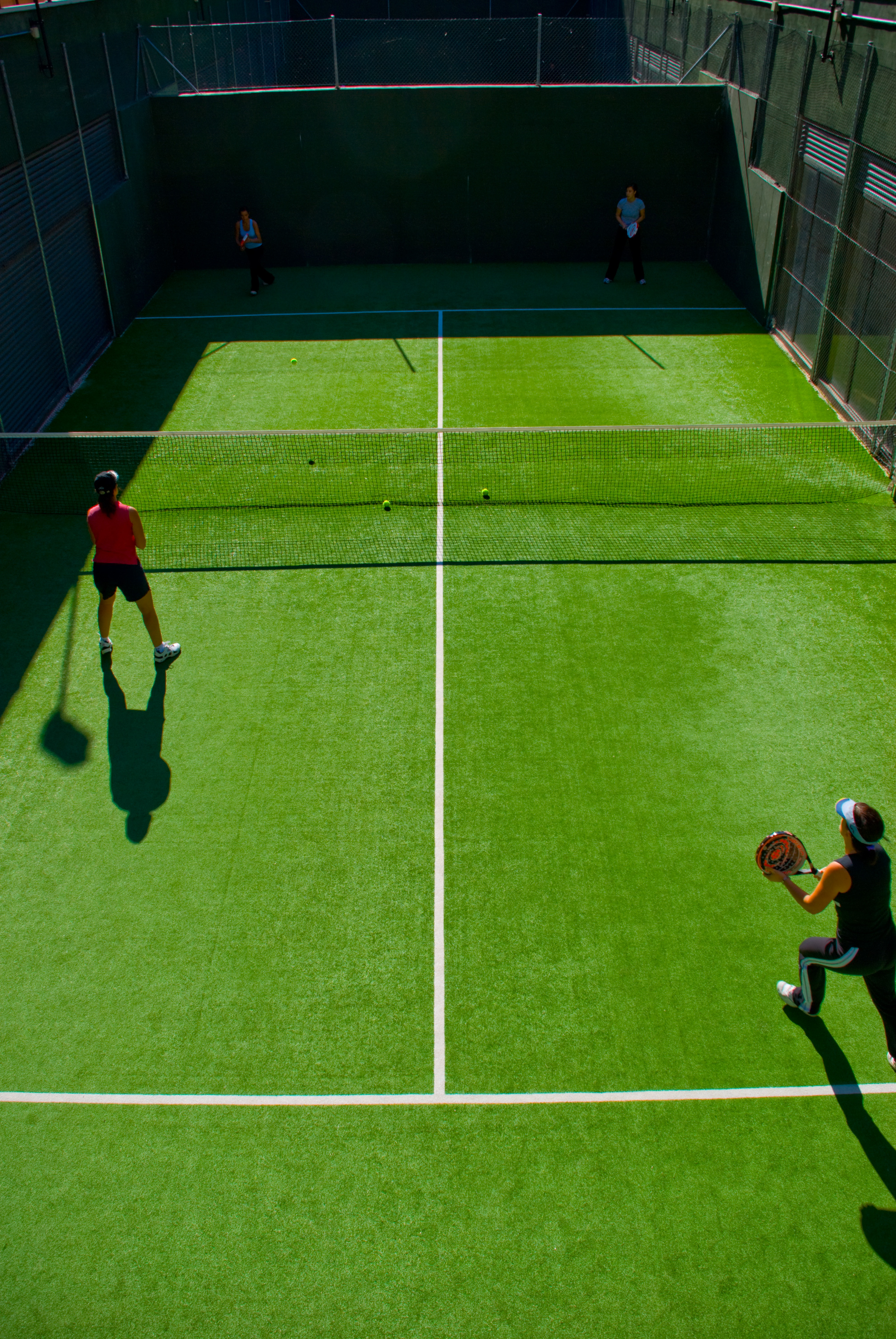 Padel